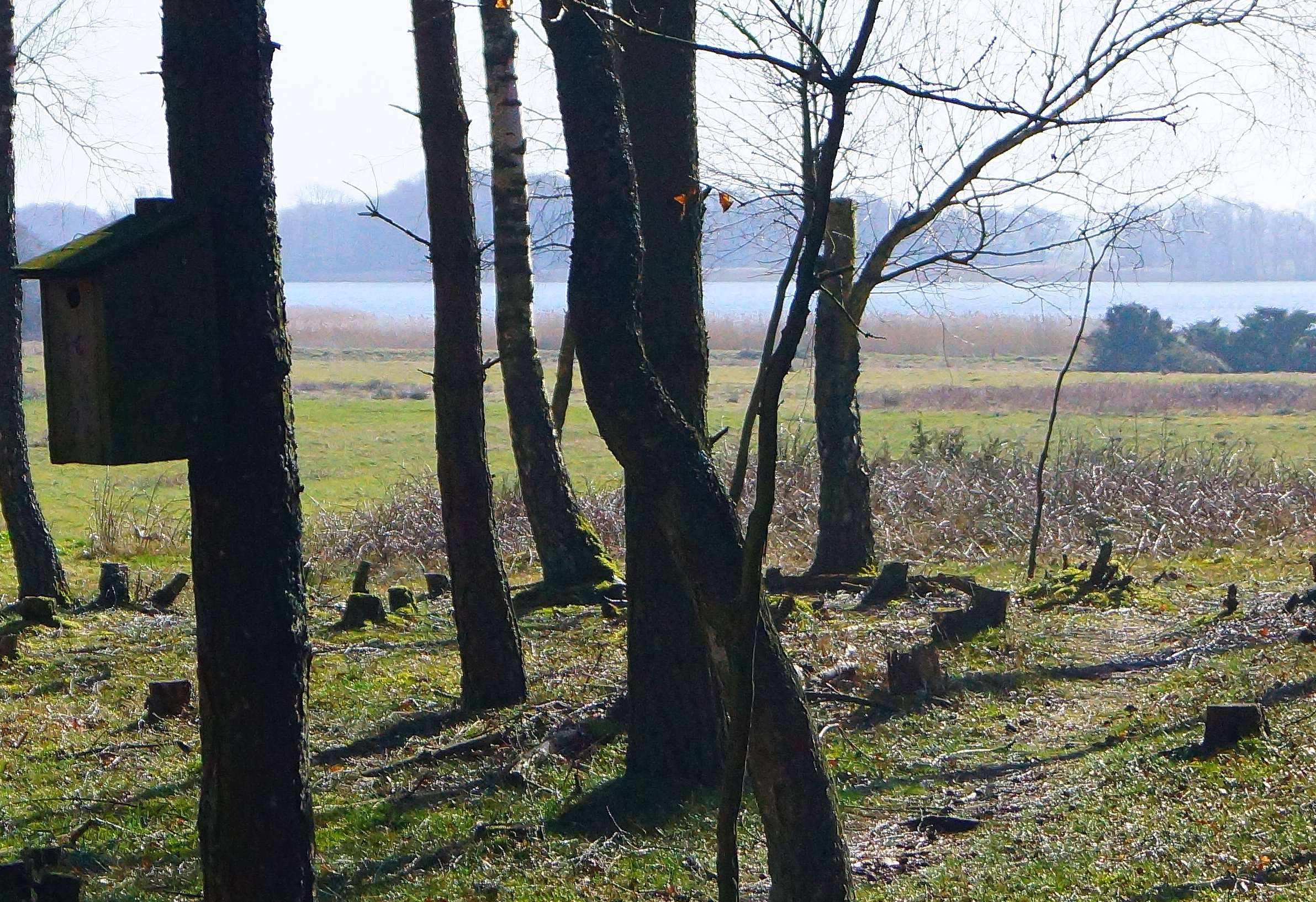 Fuglekasse Stubbe Sø